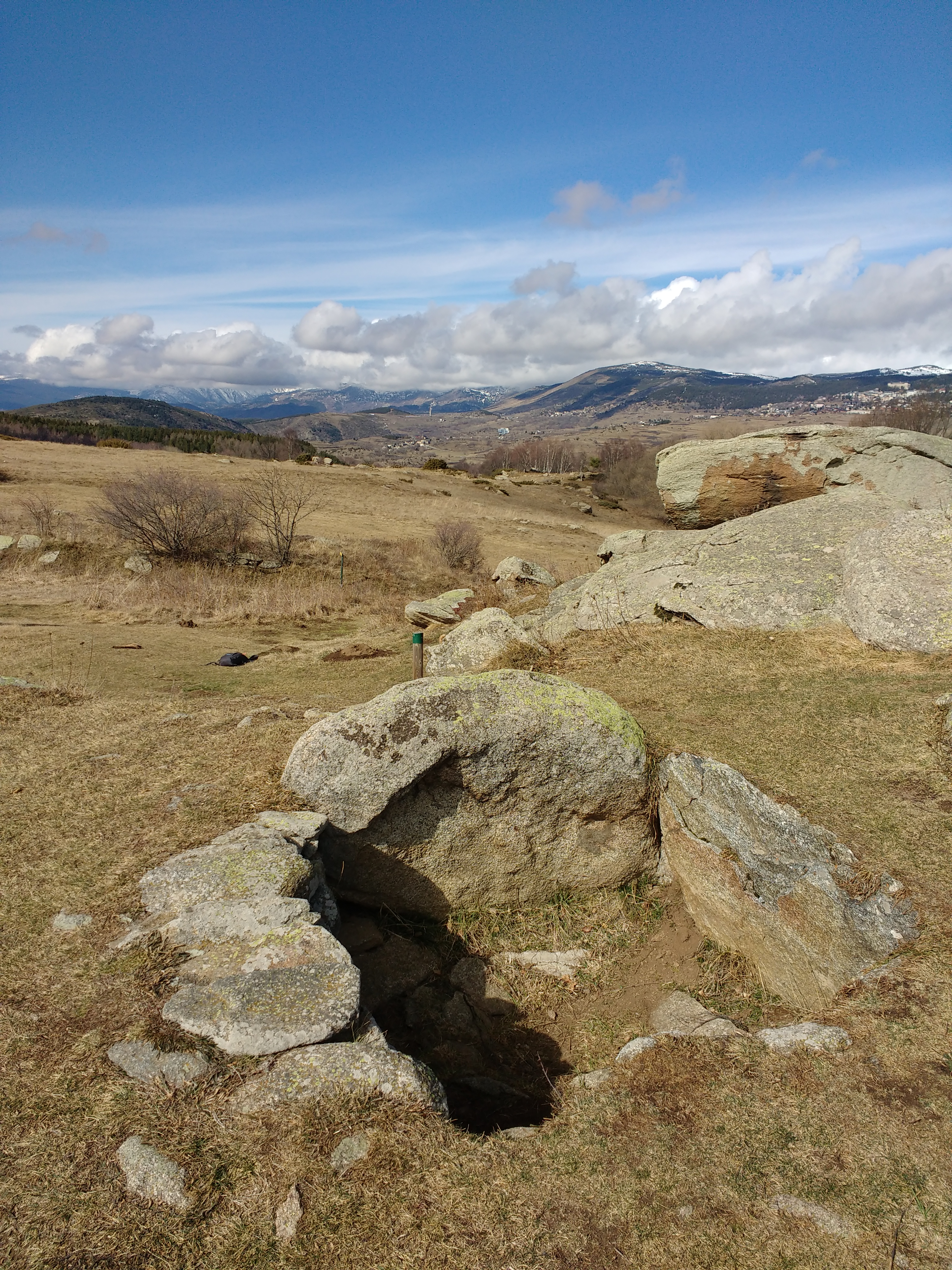 Coffre datant du Néolothique. Visible sur le GR36.